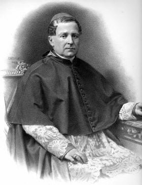 Kardinal Carlo Sacconi, Apostolischer Nuntius in München.